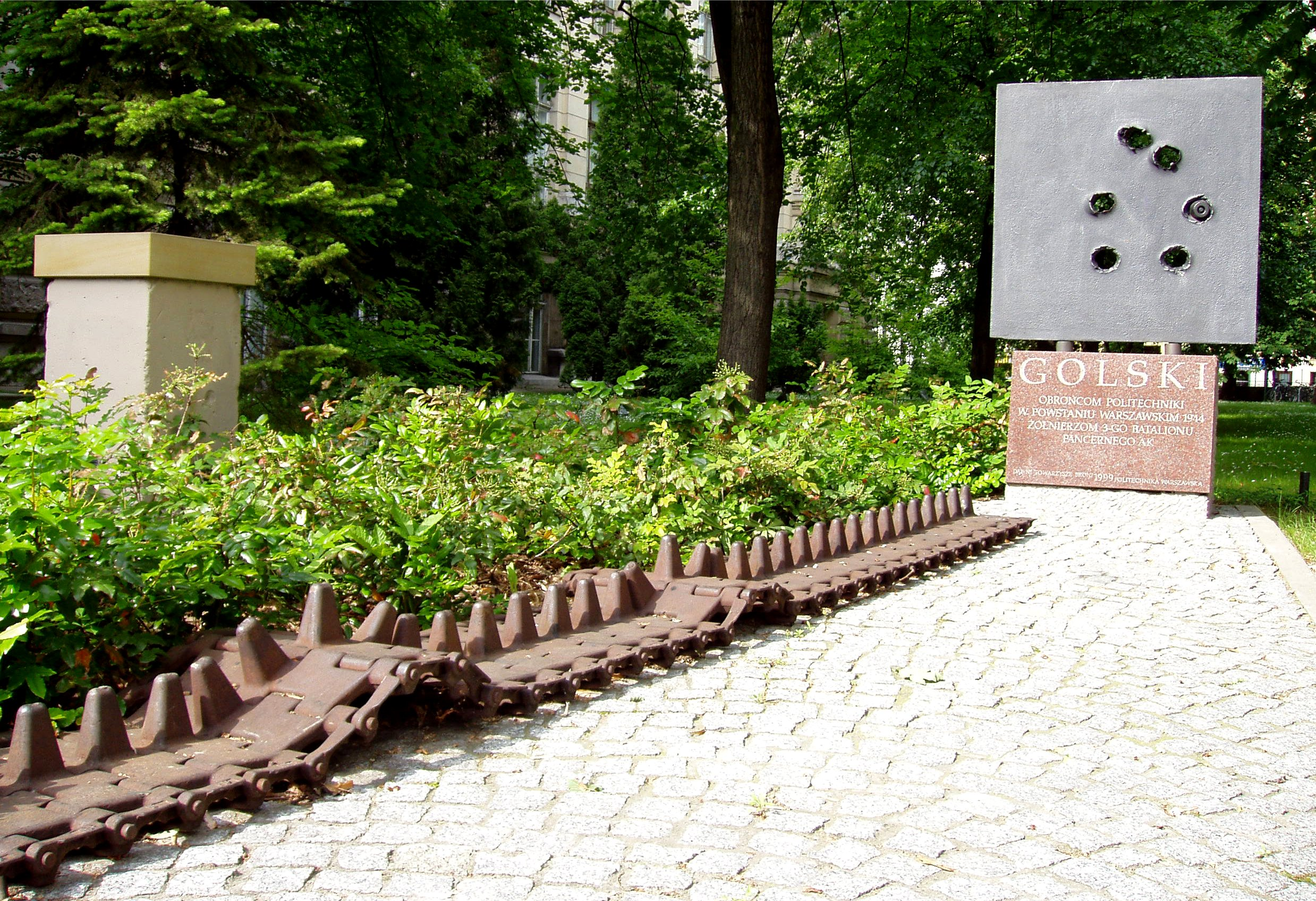 Rejon Politechniki, pamięci batalionu pancernego AK "Golski" w Warszawie (fot Zu)